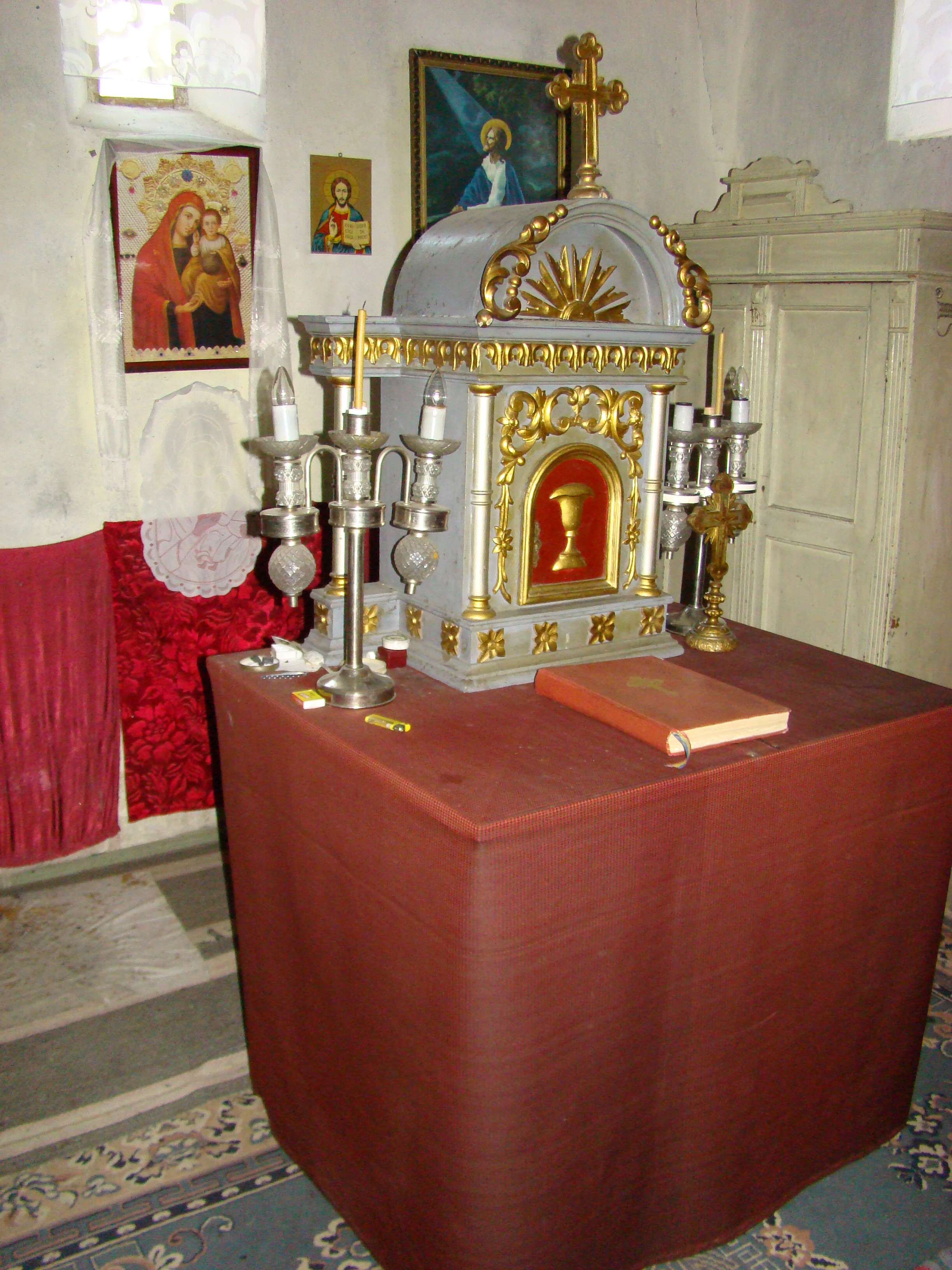 Biserica "Sf. Mare Mucenic Gheorghe", sat SÂNPETRU; comuna SÂNTĂMĂRIA-ORLEA